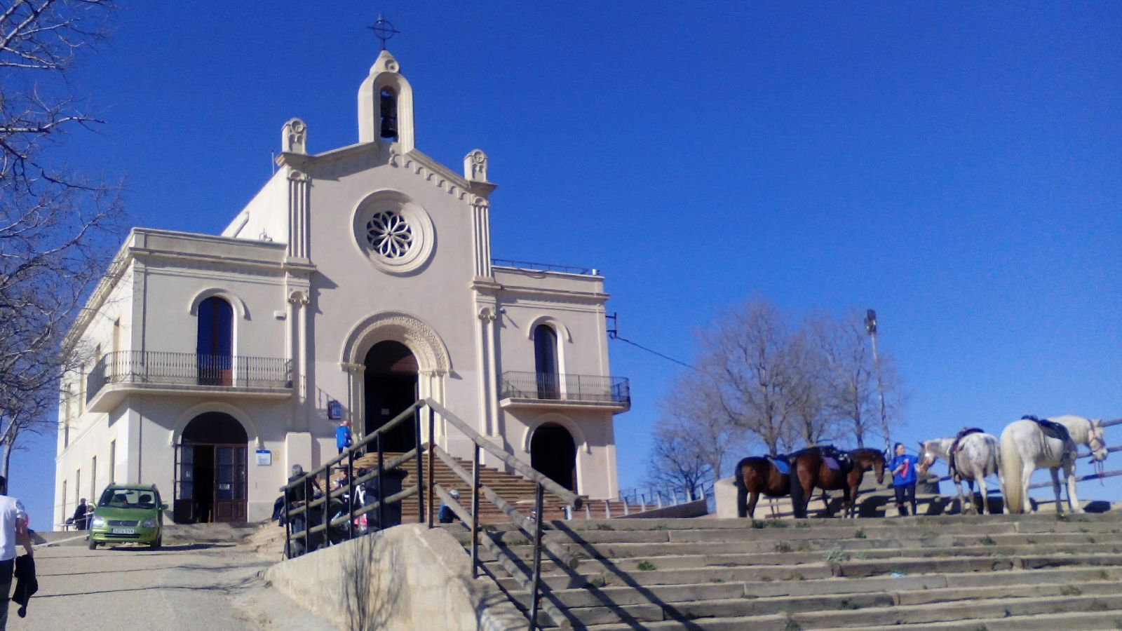 Ermita al 2016